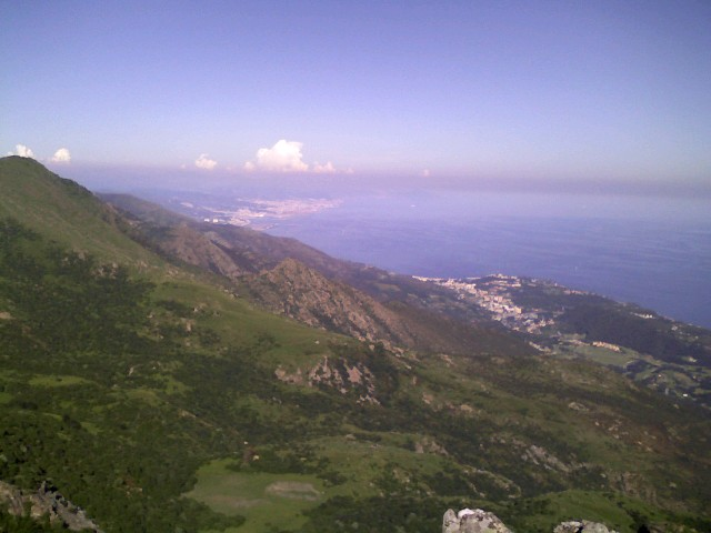 Antonello Piccone, panorama verso Genova da Monte Sciguello